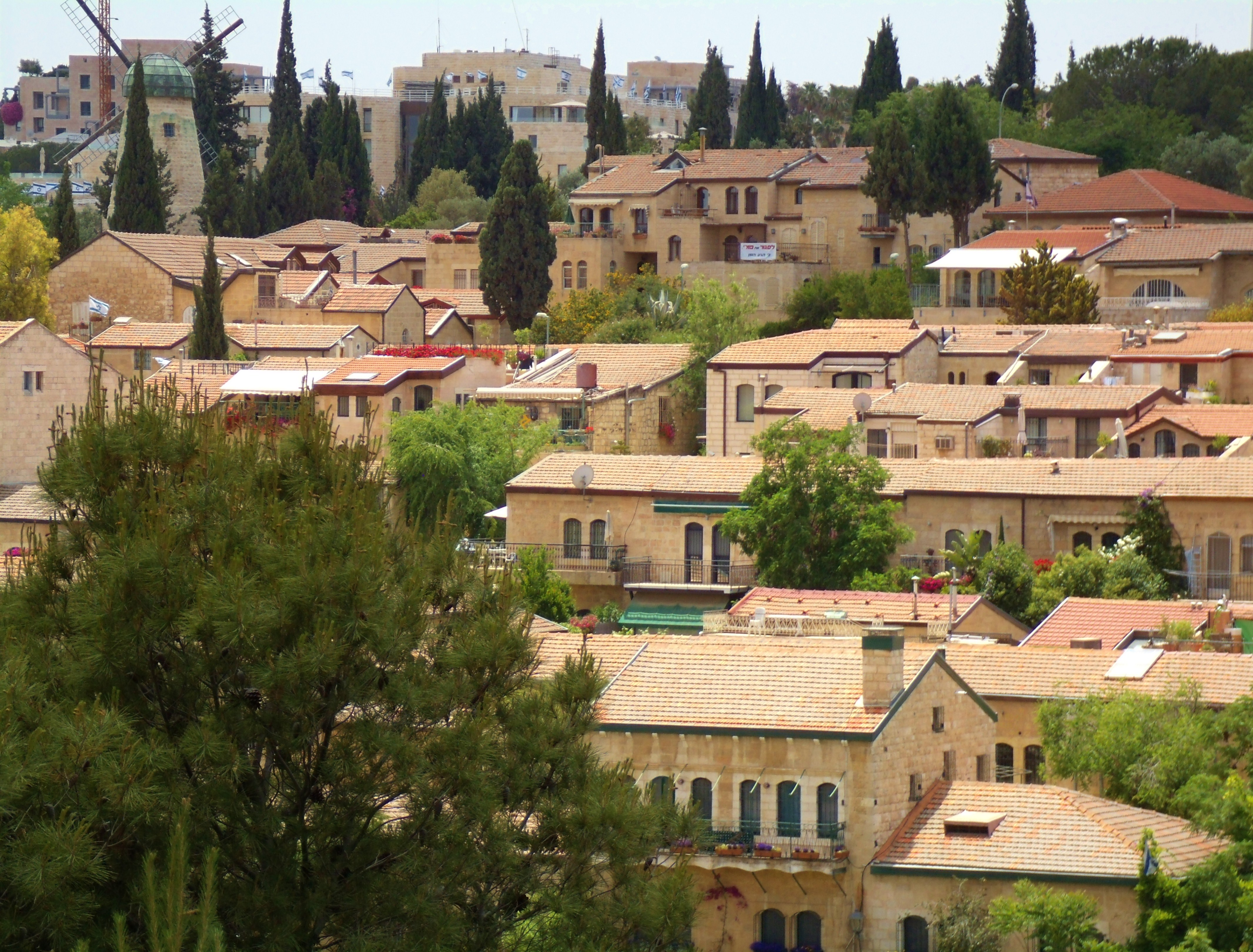 Jerusalem dwellings